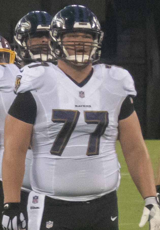 Redskins at Ravens 08/30/18